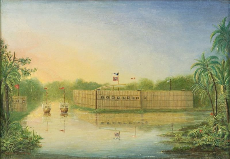 Olieverfschilderij. De vesting (benting) werd op 7 November 1858 onder leiding van Luitenant ter zee 1e klasse K. Bunnik ingenomen.. De vesting in Reteh op Sumatra